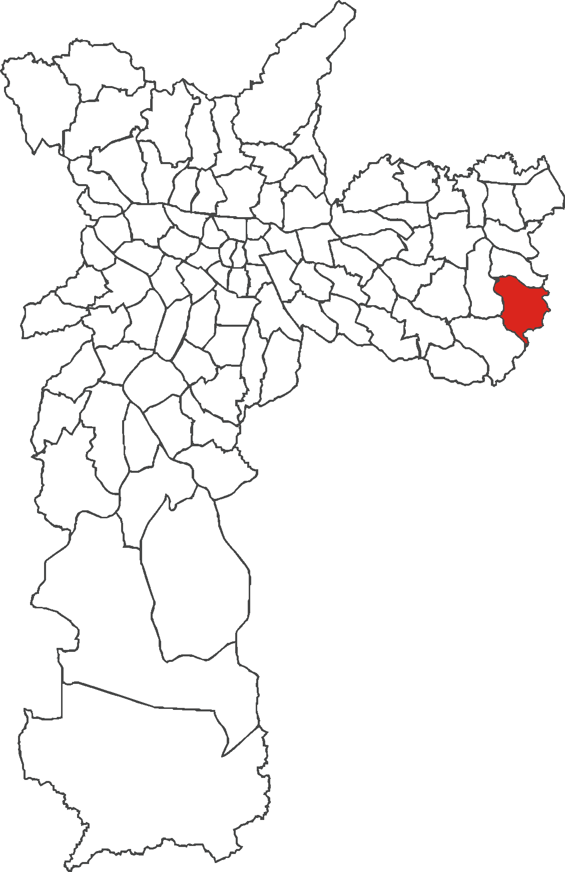 Localização do distrito de Cidade Tiradentes no município de São Paulo.